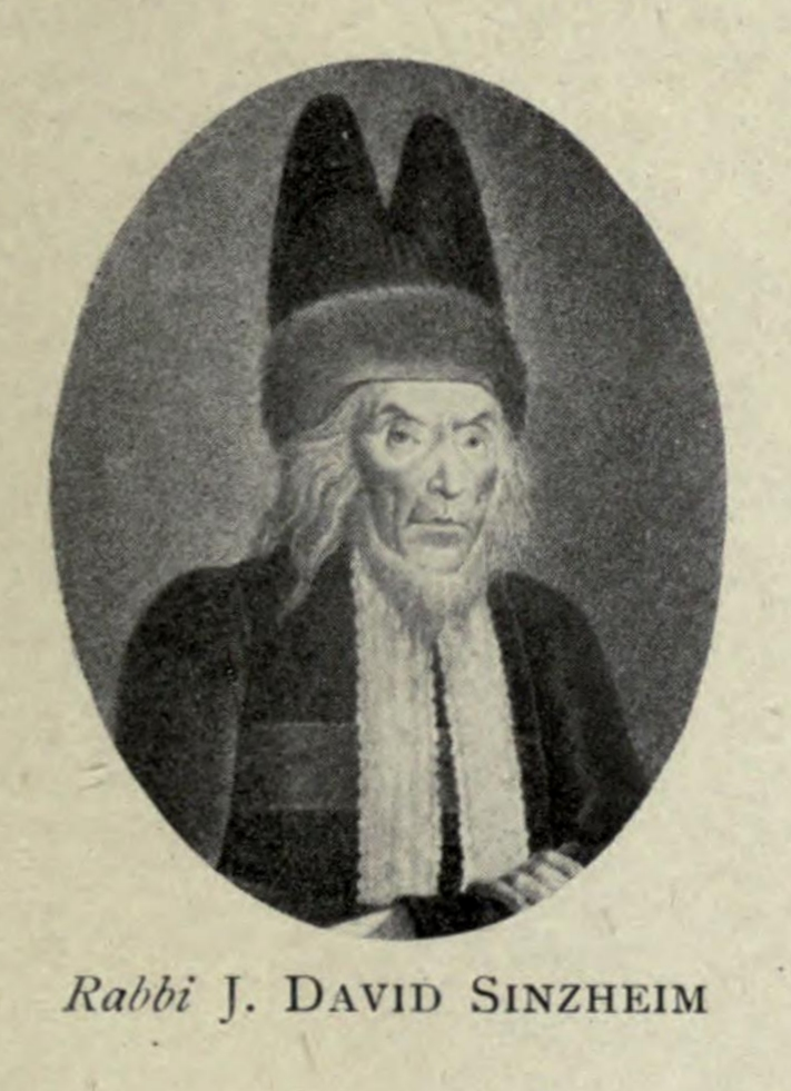 Rabbi David Sinzheim au Grand Sanhédrin